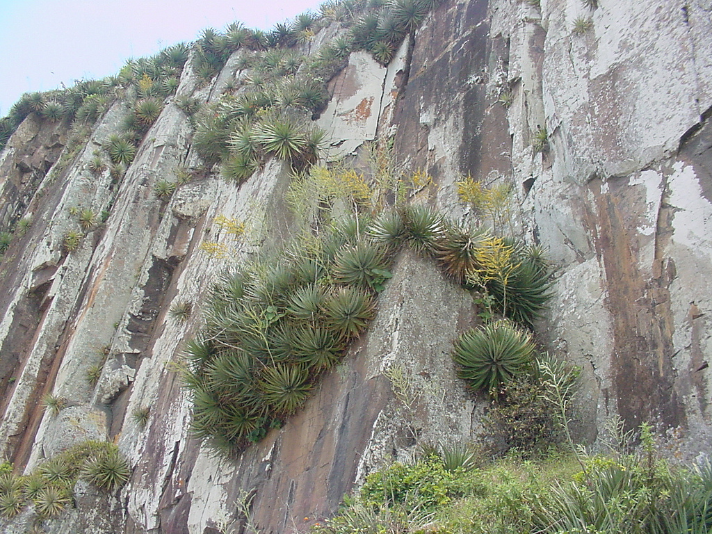 Dyckia maritima - BROMELIACEAE - Torres - RS - Brasil.